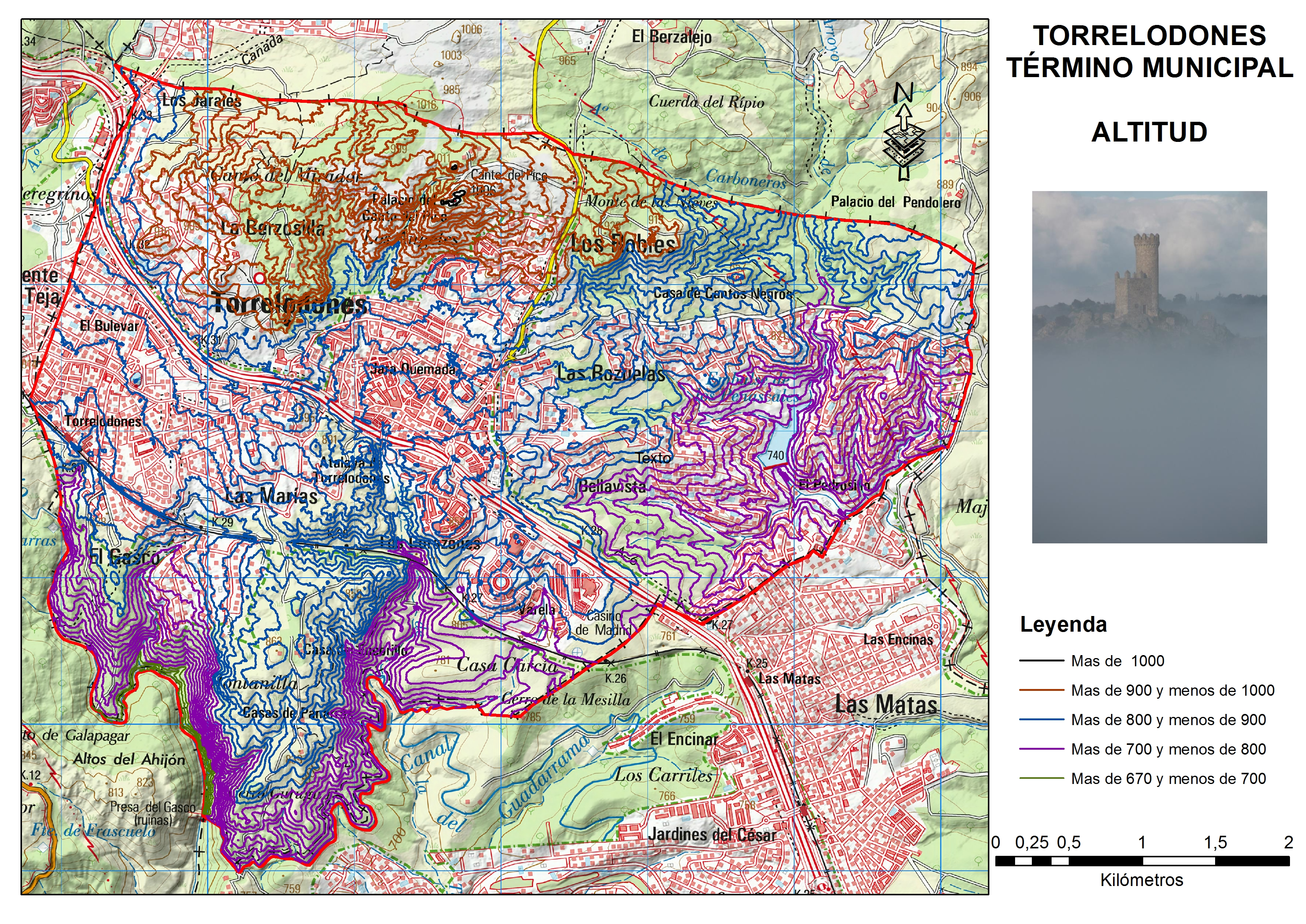 Mapa de relieve con alturas de Torrelodones. Madrid.